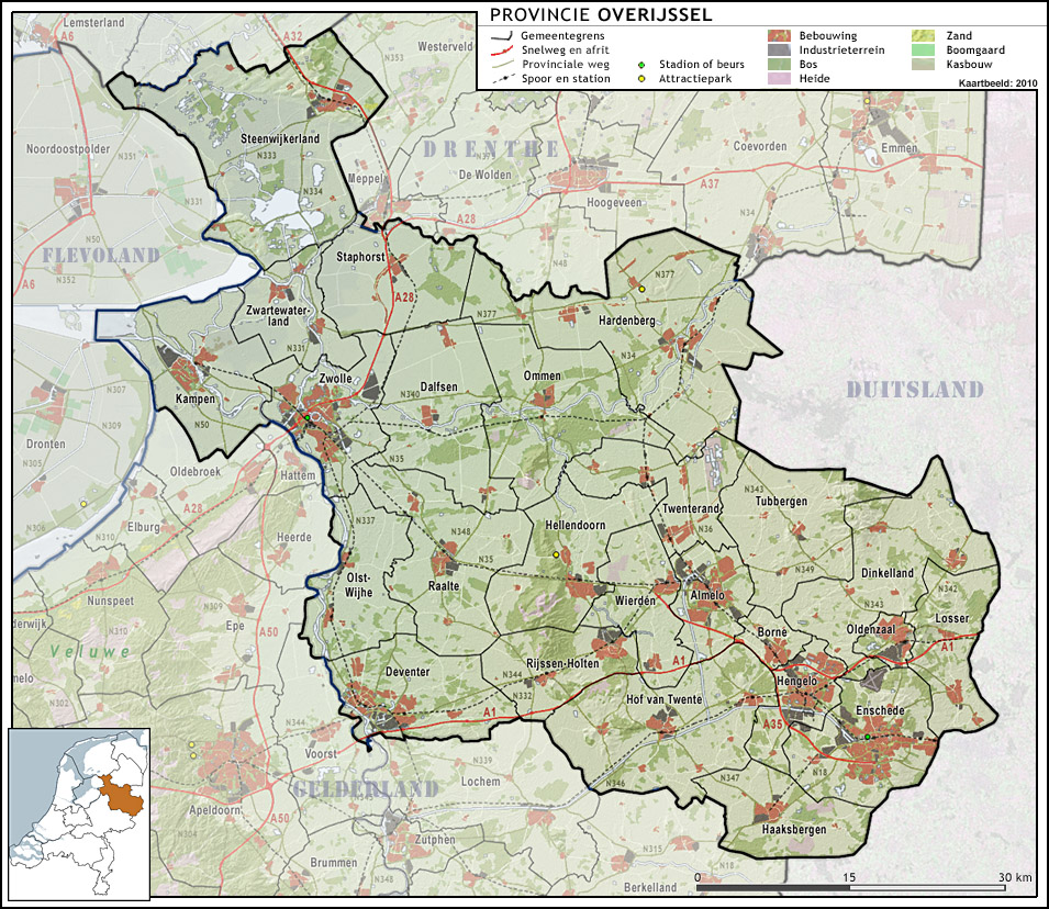 Provincie Overijssel, met indeling van gemeenten (2010) en impressie van het landschap. Door Jan-Willem van Aalst, samengesteld uit publiek beschikbare geo-data: Referentie-ondergrond (kustlijn, steden, wegen) gerasterd uit de OpenStreet Map OSM. ( Inhoud is beschikbaar onder de Creative Commons Attribution-ShareAlike 3.0 license. Referentie-ondergrond op water bewerkt vanuit Gebruik is vrij met bronvermelding NLR en ESA. Vectorgrenzen van gemeenten en regio's vrij ter beschikking gesteld met dank aan cartografen van brandweerregio's Hollands-Midden en IJsselland; gerasterd in Photoshop. Hoogte-aanduidingen (reliëf) gerasterd uit de AHN Viewer ( gebruik is vrij met bronvermelding (c) AHN, Overige kenmerken op de kaart: eigen tekenwerk van Jan-Willem van Aalst, op basis van gerasterde gemeentegrenzen.